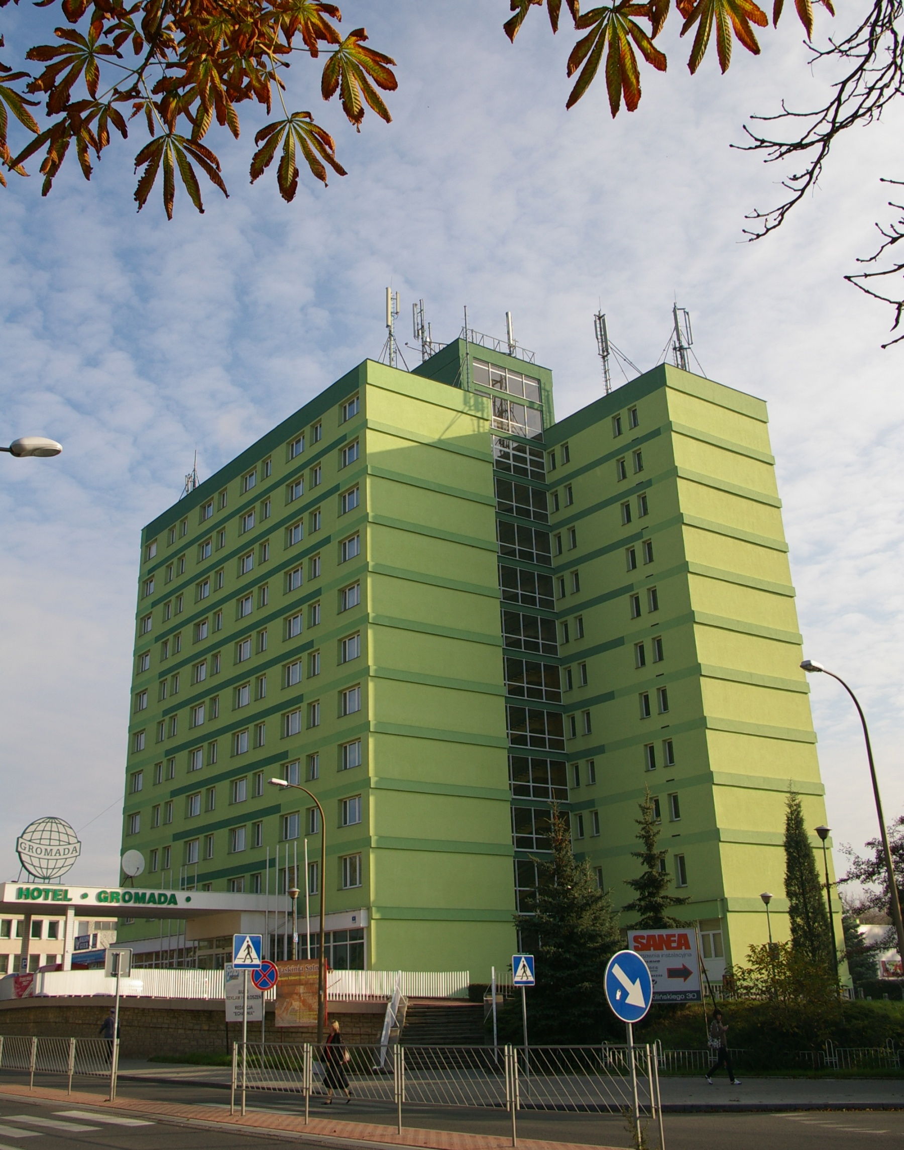 Hotel Gromada w Ostrowcu Świętokrzyskim